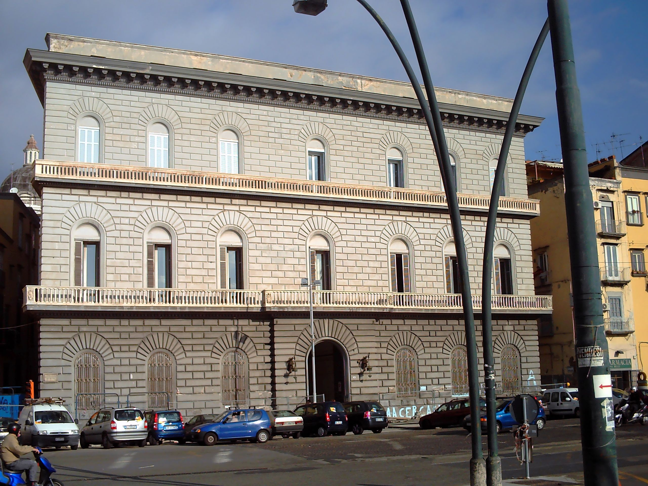 Palazzo monumentale alla Riviera di Chiaia